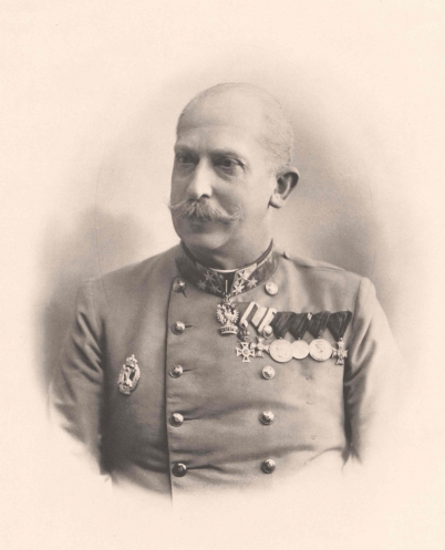 Franz Xaver von Schönaich (1844–1916)